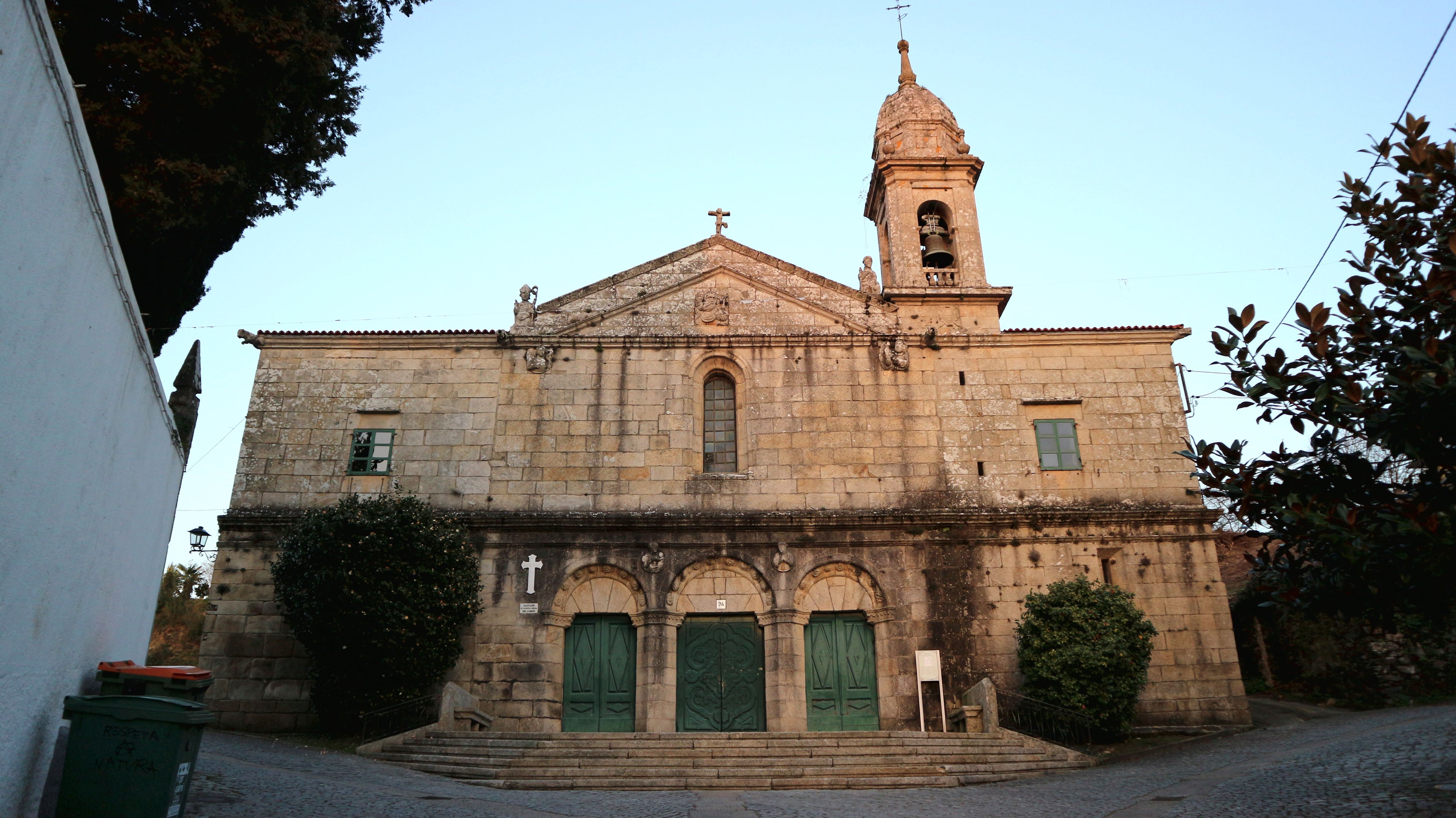 Igrexa da Nosa Señora do Camiño, Betanzos.